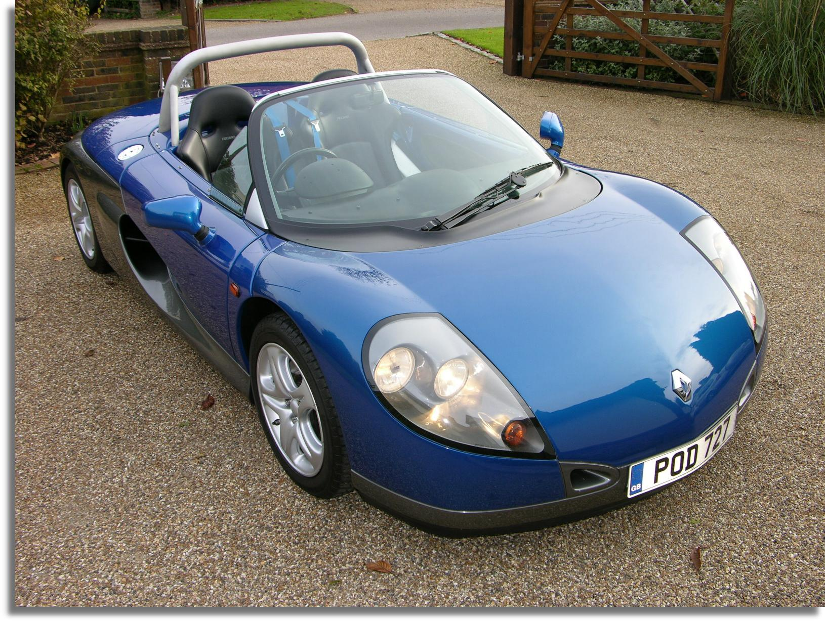 RenaultSport Spider